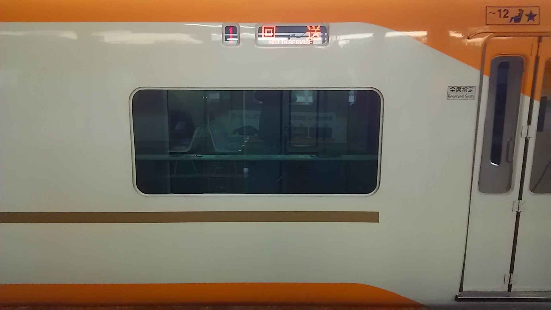 近鉄30000系喫煙室外観。東生駒駅にて撮影。